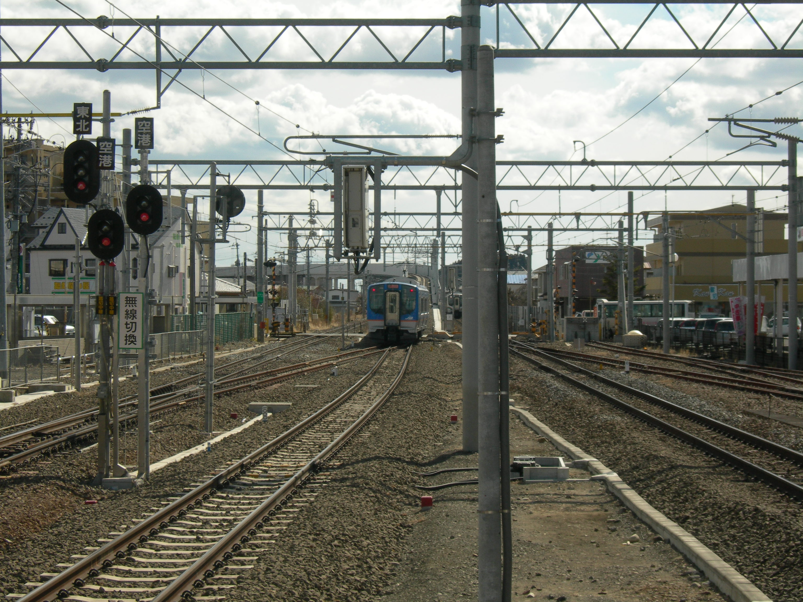 名取駅ホームから見た福島方面